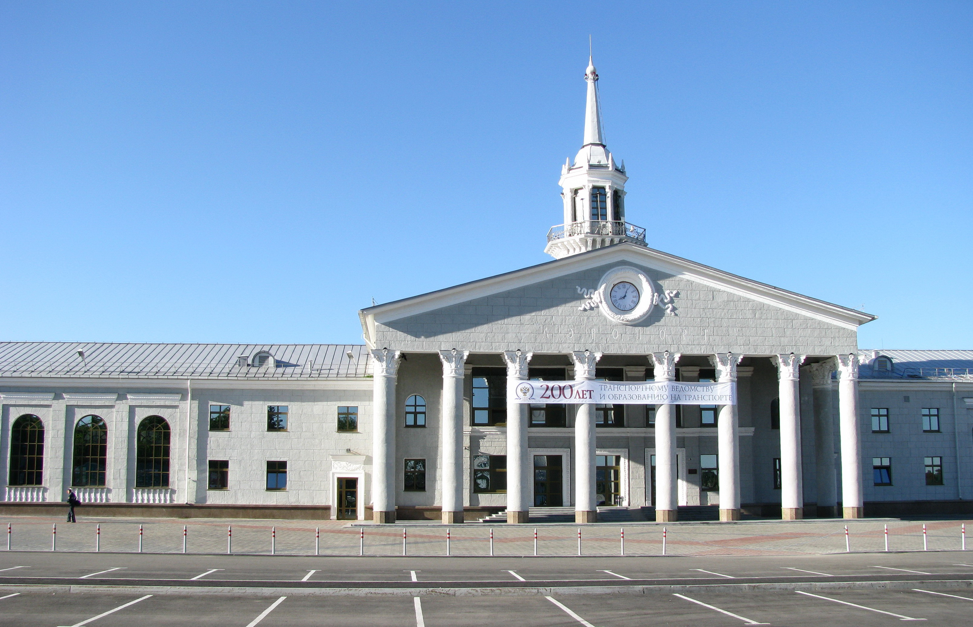 Аэропорт в Екатеринбурге